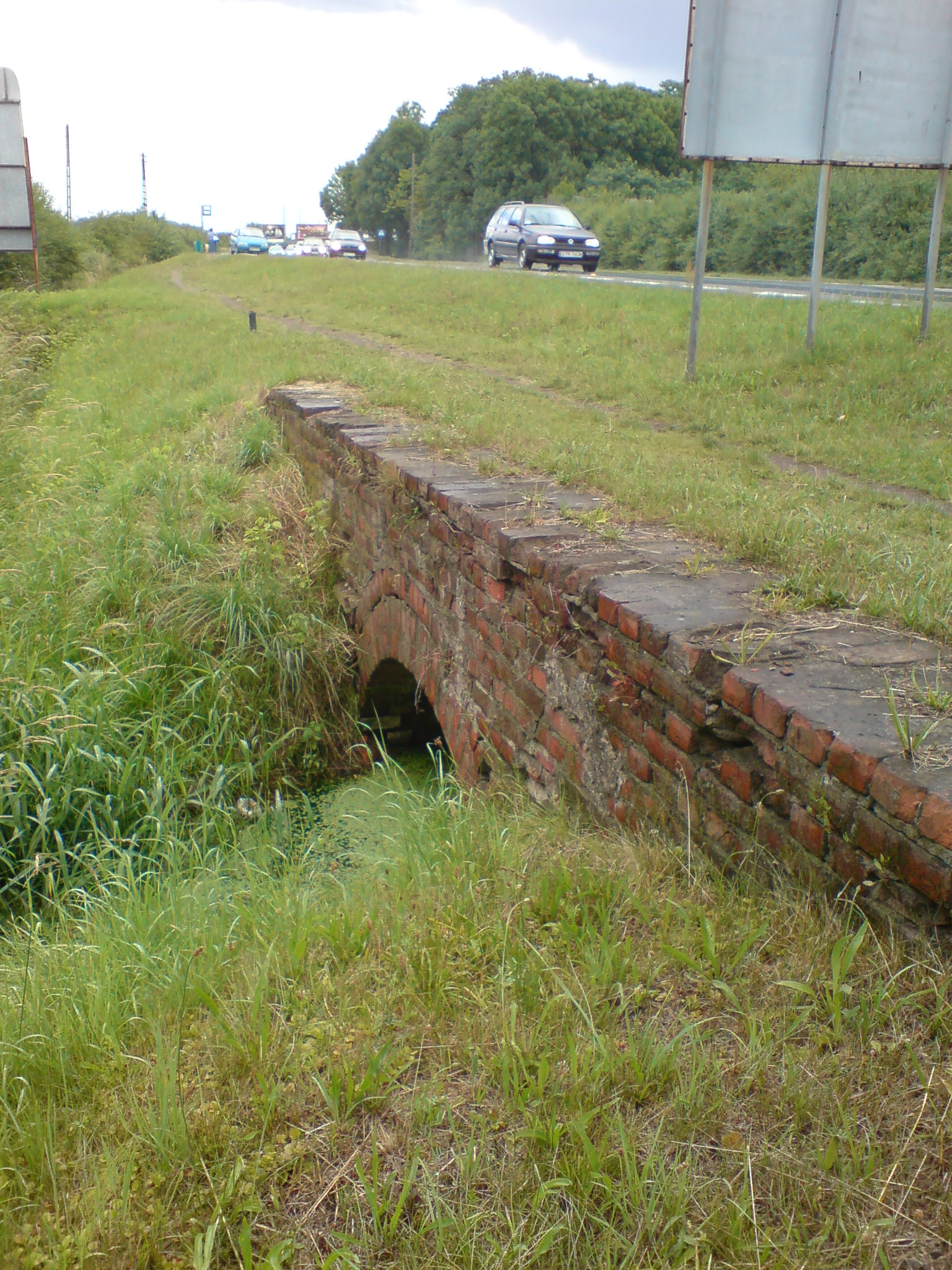 Początkowy odcinek ulicy Sułowskiej (przedłużenie Żmigrodzkiej) we Wrocławiu - strumień Mokrzyca wypływający spod ulicy.